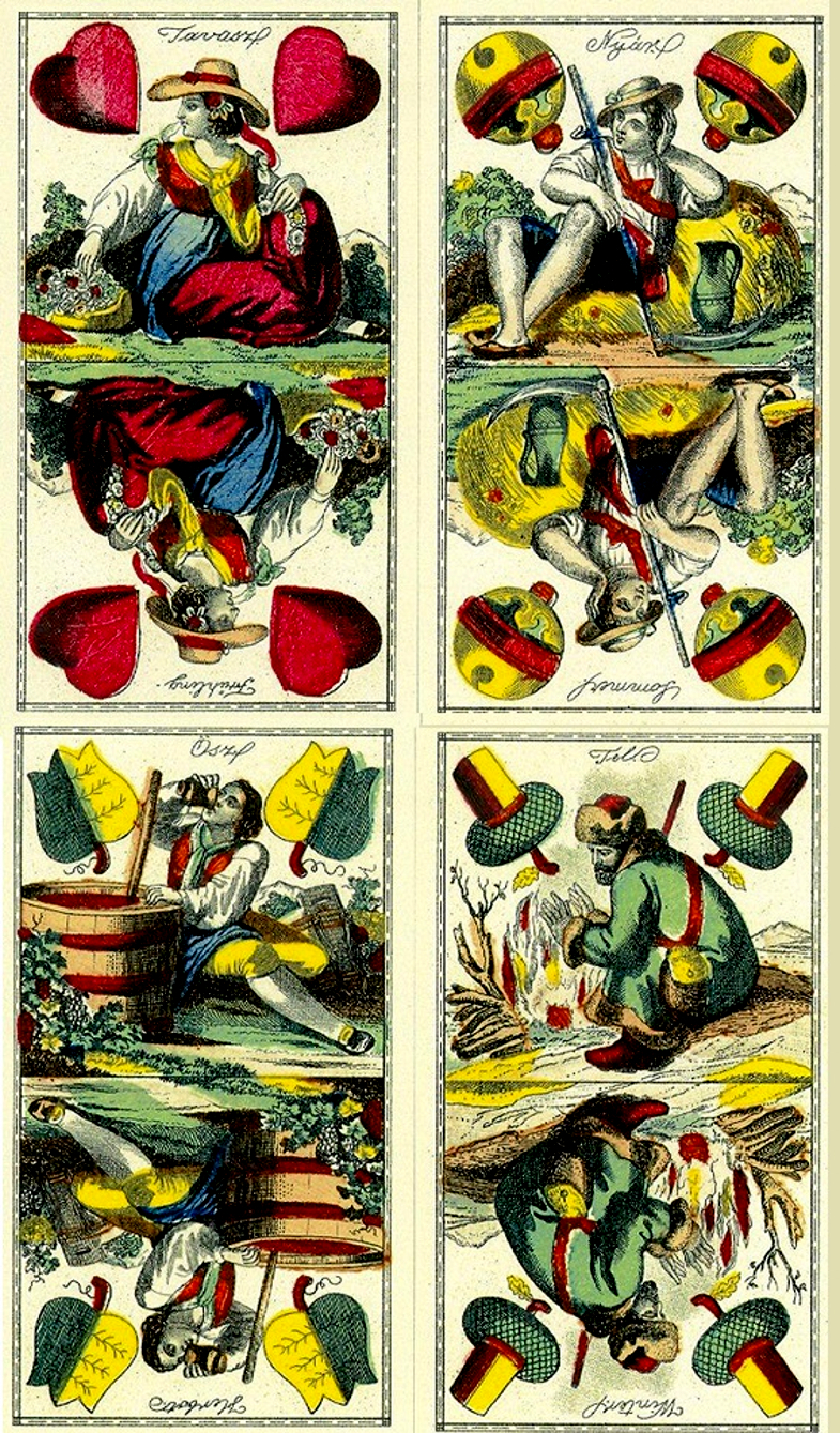 Eredetileg Schneider József kártyafestő műve a Tell-kártya. Az 1860-as években bécsi metszetkészítők" Josef Sürch és Josef Neumayer, egyikük Ferdinand Piatnik, a másik Josef Glanz kártyagyárának megbízásából" rajzolták meg azokat a változatokat, melyeket a mai napig szinte változatlanul használnak a kártyagyárak. Budapesten magyar kártya, Bécsben Doppeldeutsche.